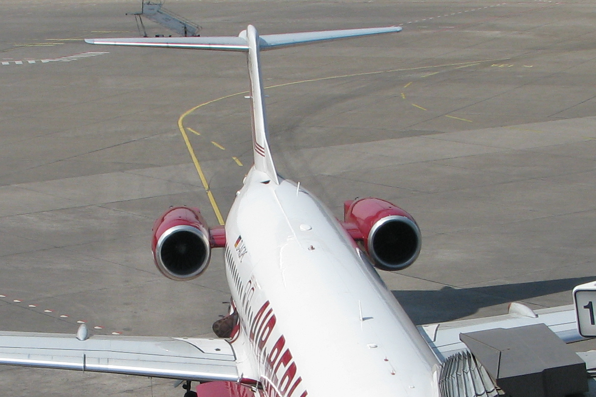 Fokker 100 Jets seitlich am Rumpf, Flughafen München